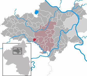 Gering in Rhineland-Palatinate - district Mayen-Koblenz